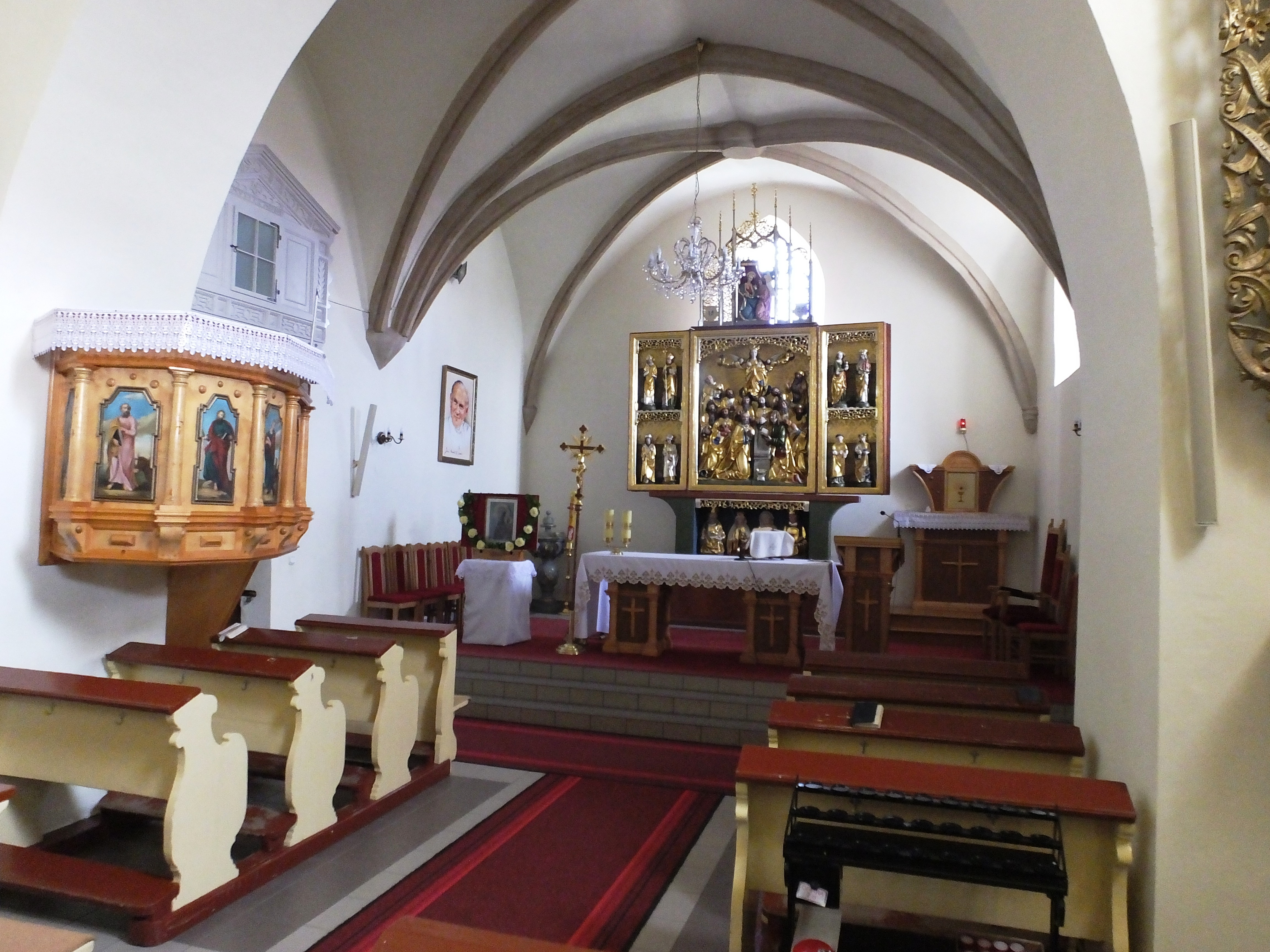 kościół w Pisarzowicach k.Kamiennej Góry